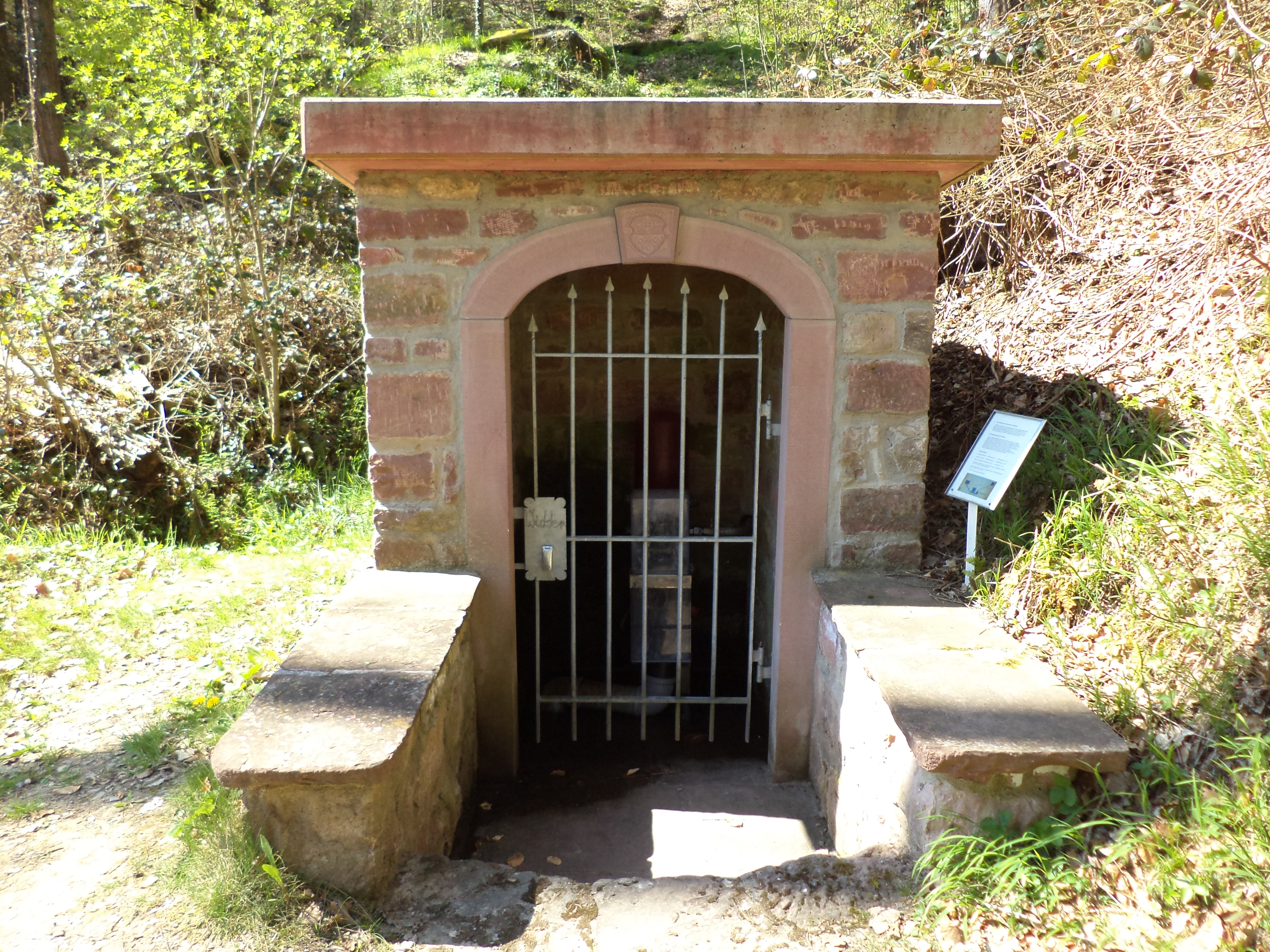 Die Brunnenstube des Widders zwischen Unterwittbach und Kreuzwertheim im Spessart